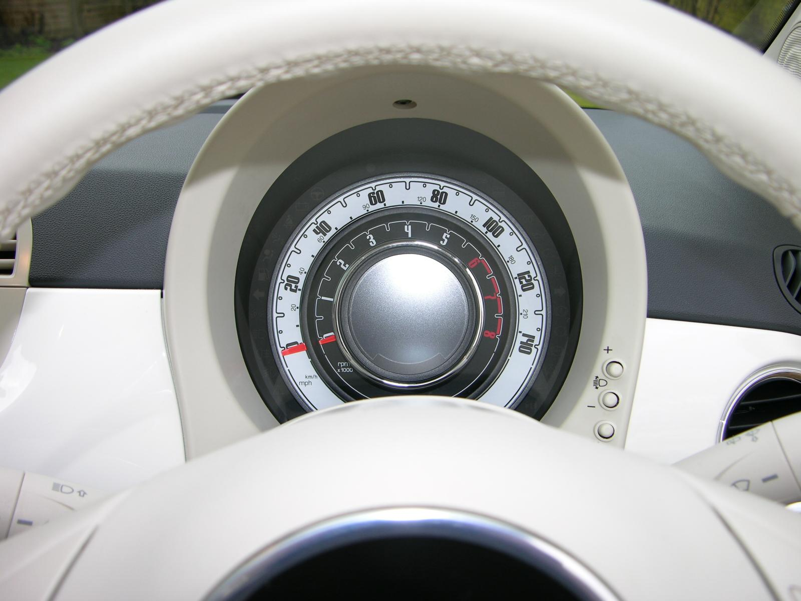 2008 FIAT 500 1.4 Lounge.